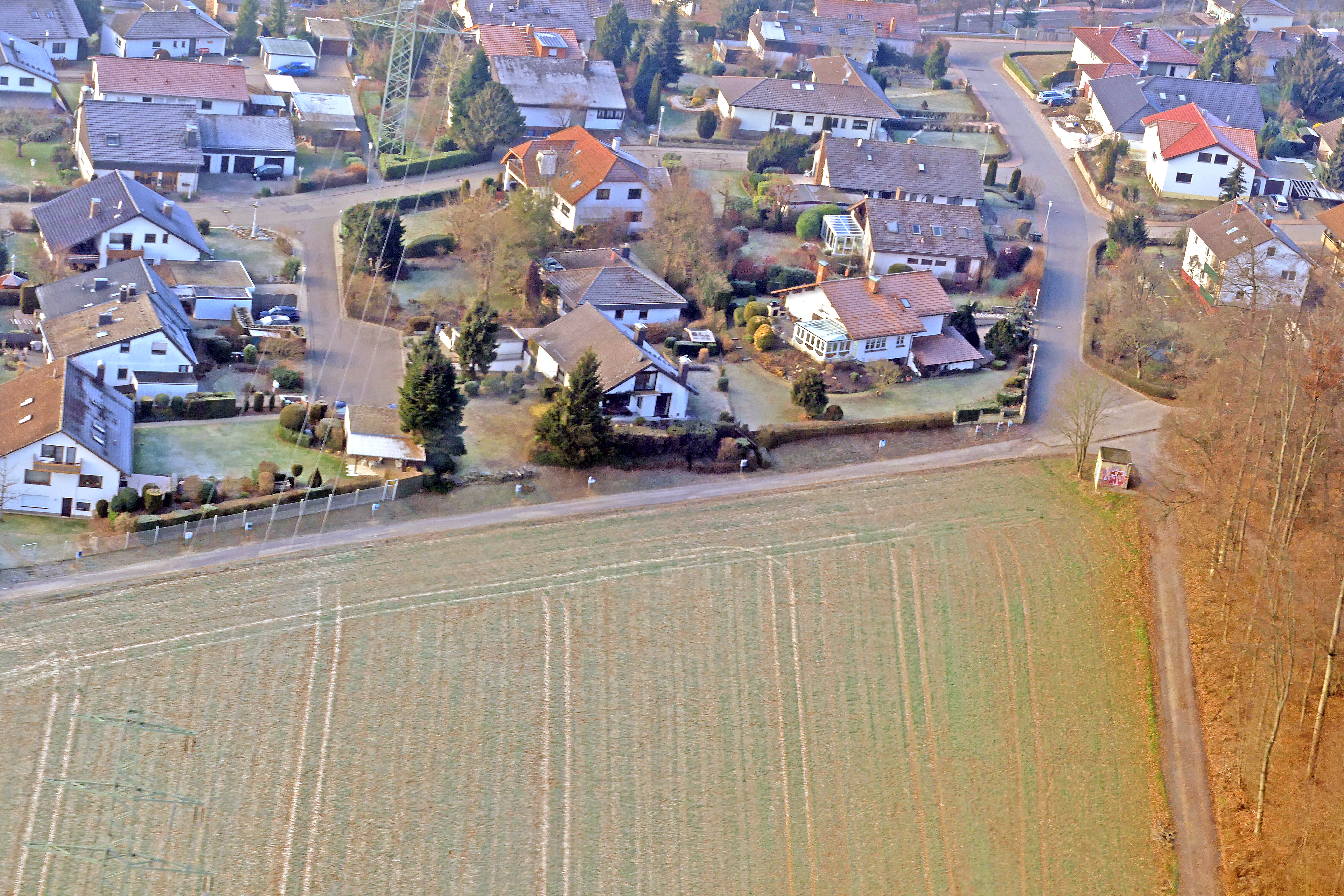 Haupt- und Abschlussteil des Evolutionswegs in Gauangelloch. Haupt- und Abschlussteil des Evolutionswegs in Gauangelloch, aus einem Tragschrauber heraus fotografiert. Am Ende kumulieren die dargestellten evolutionären Ereignisse, da deren zeitliche Abfolge immer näher beieinander liegt und die Wegstrecke in Relation zu der Zeitabfolge ist.